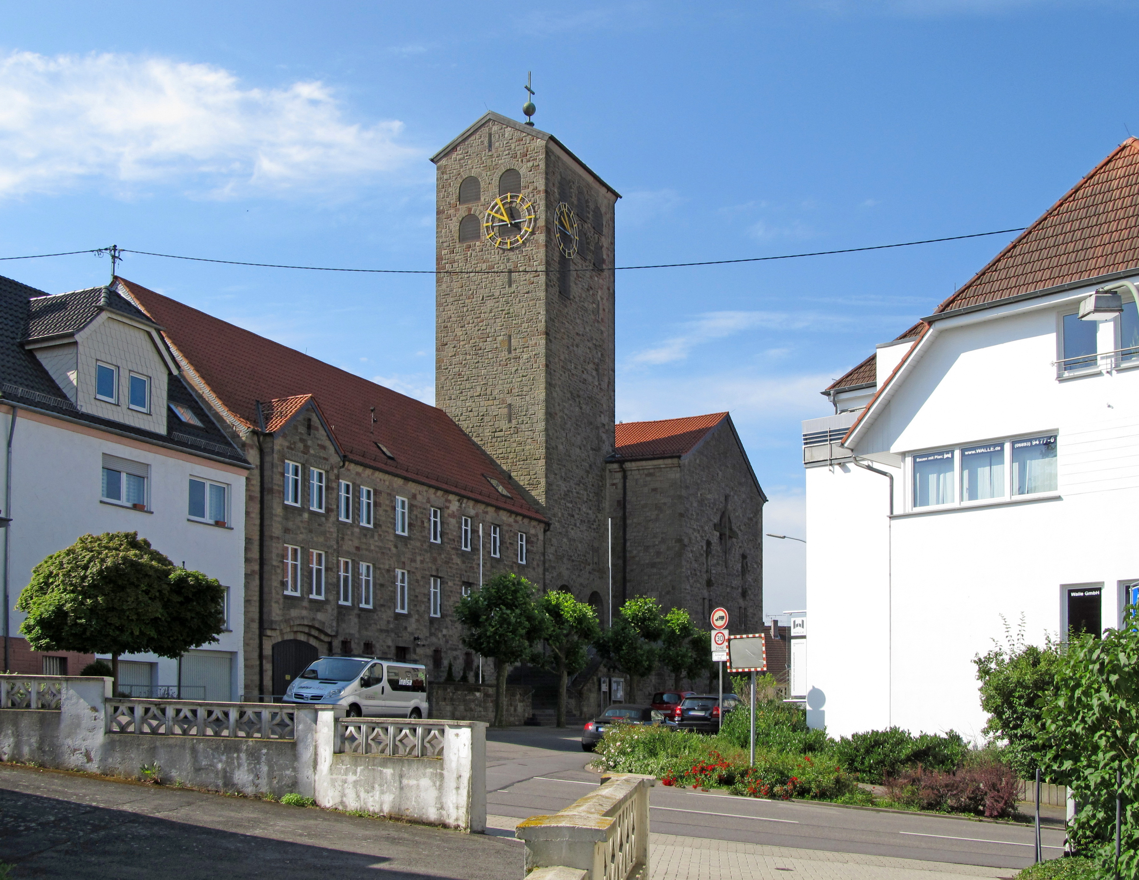 Blick in die Mauritiusstraße mit der katholischen Pfarrkirche St. Mauritius in Ormesheim, Mandelbachtal, Saarland